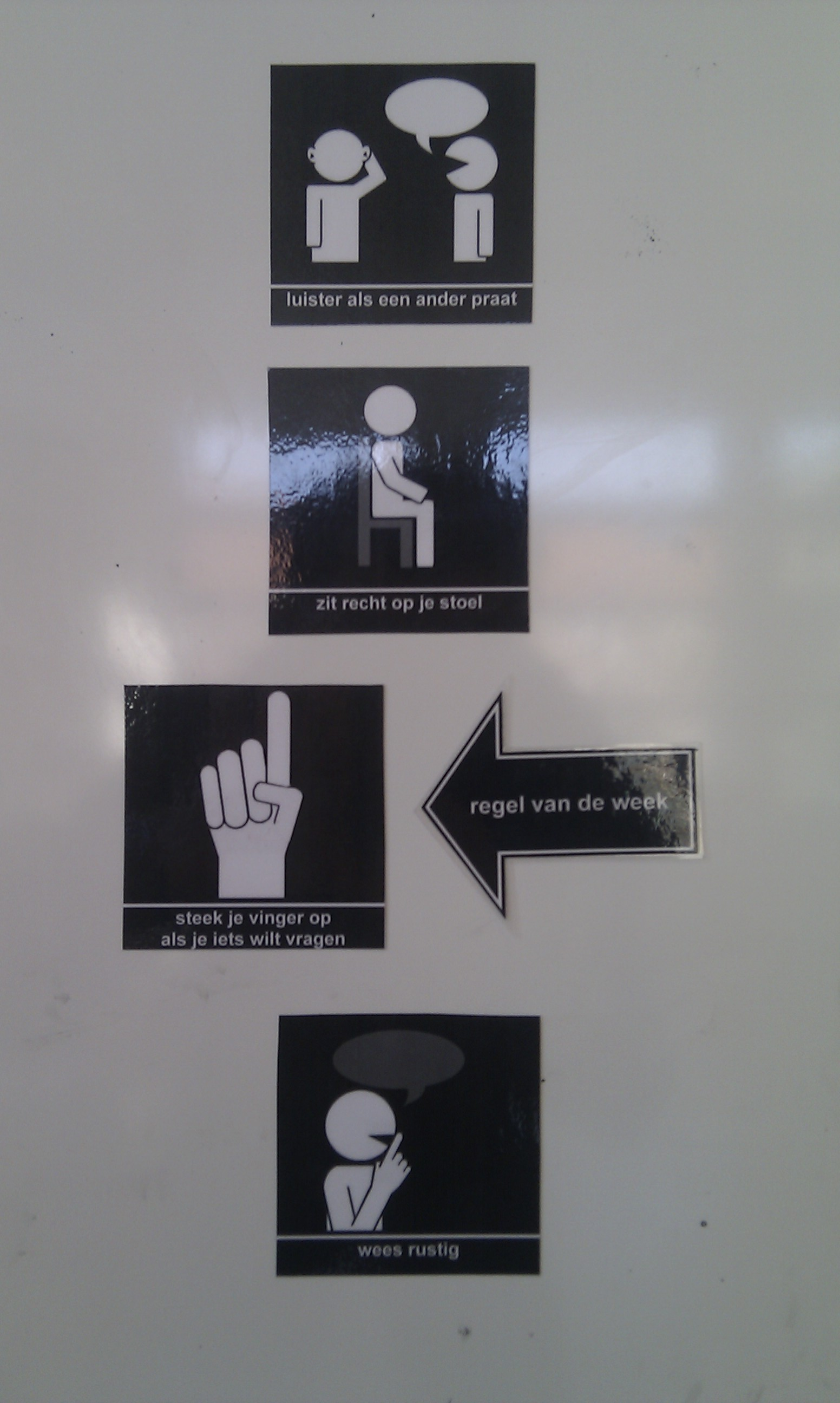 Voorbeeld van klassenregels op een basisschool in Nederland.